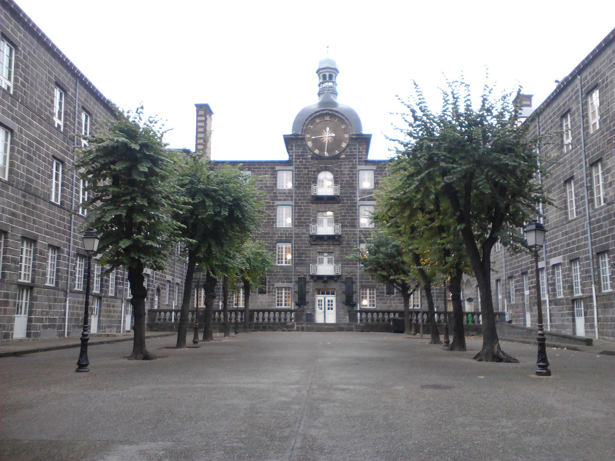 Cour intérieure du Centre Blaise-Pascal à Clermont-Ferrand, ayant abrité jusqu'en 1950 le Lycée Blaise-Pascal. Le Centre Blaise-Pascal, délimité par la rue du Maréchal-Joffre, la rue Neuve-des-Carmes et la rue de l'Abbé-Girard, abrite aujourd'hui : le Conservatoire à rayonnement régional de Clermont-Ferrand Emmanuel-Chabrier, l'École municipale de danse, le Centre Loisirs et Rencontres, l'Espace Citéjeunes, et l'Orchestre d'harmonie de Clermont-Ferrand. La photographie est prise depuis le porche d'entrée donnant sur la rue Neuve-des-Carmes.